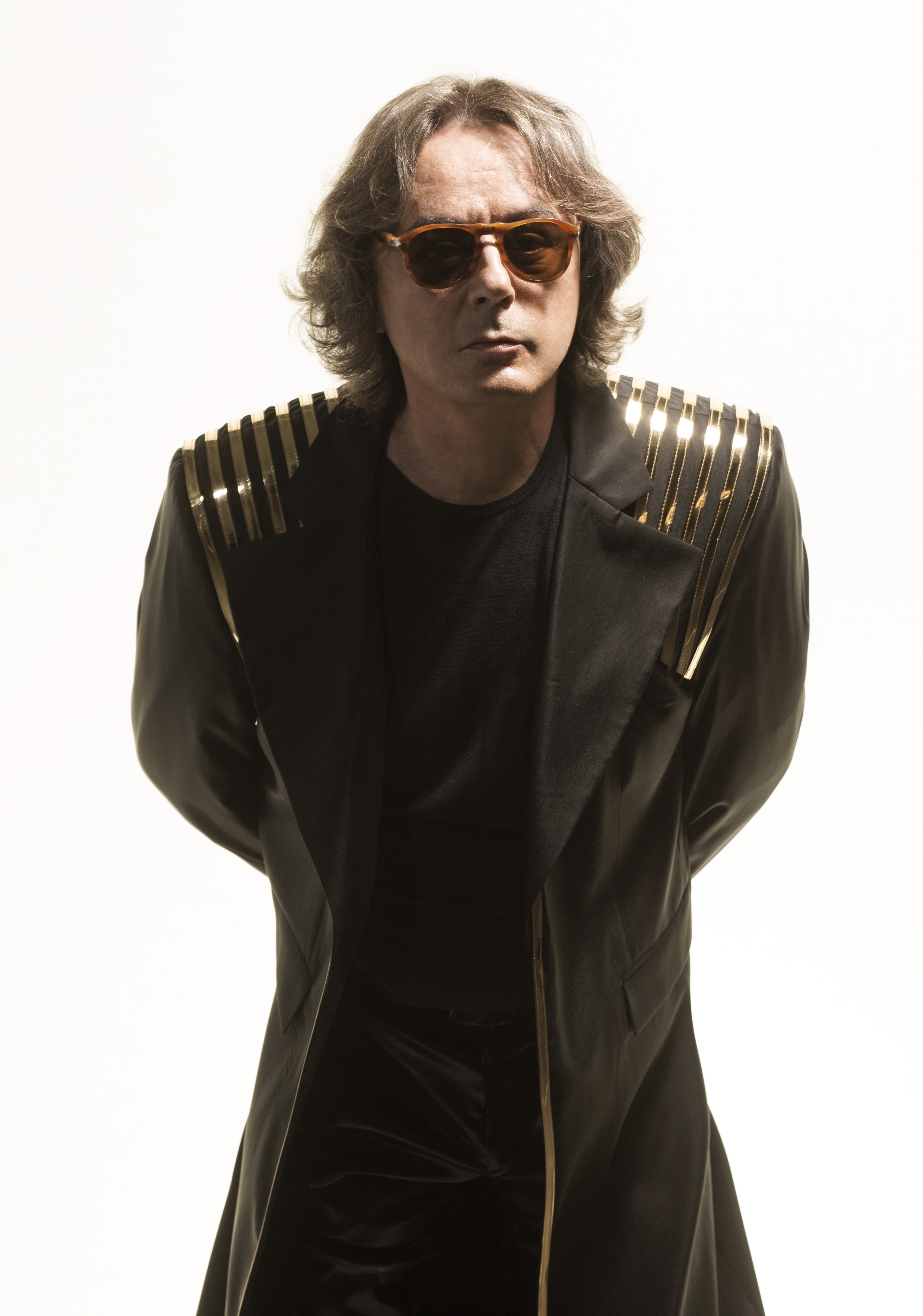 Александар Сања Илић у оквиру пројекта Stand Up